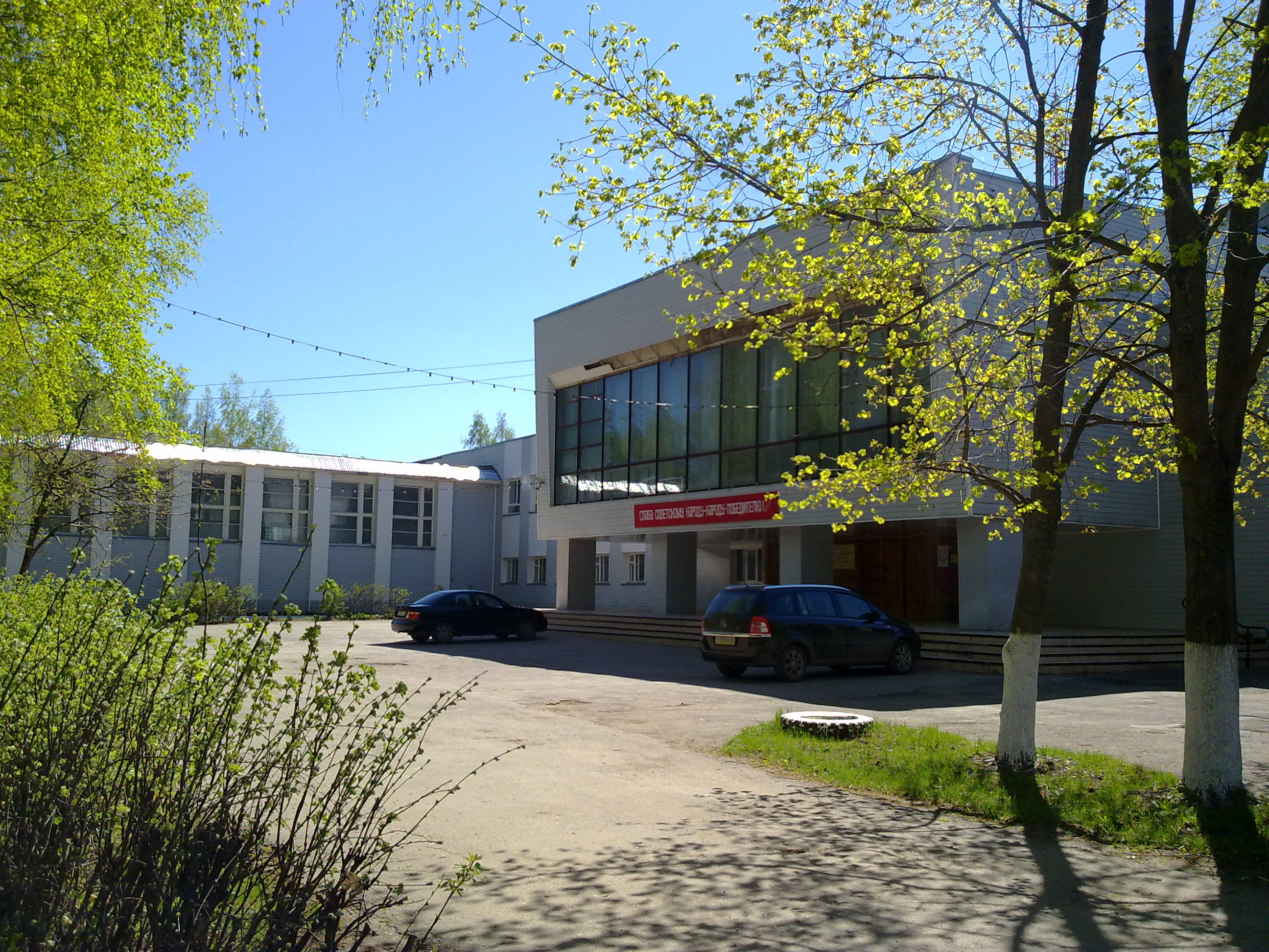 Фото Кораблинского районного дома культуры